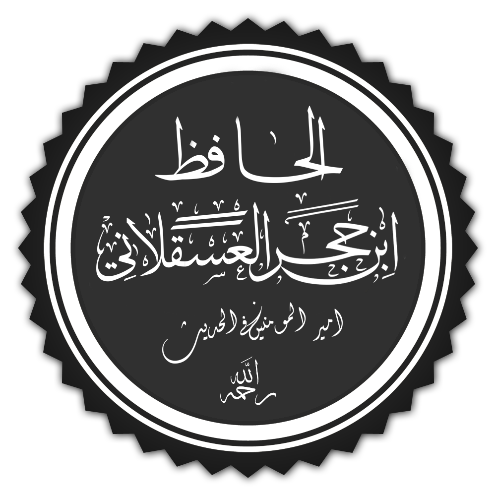 تخطيط لاسم الحافظ ابن حجر العسقلاني